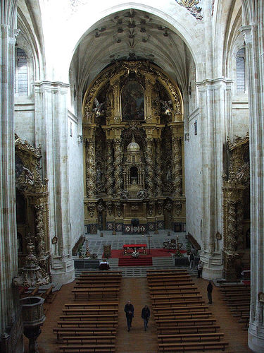 Retablo de la Iglesia del Convento de San Esteban en Salamanca, por José de Churriguera (1692)